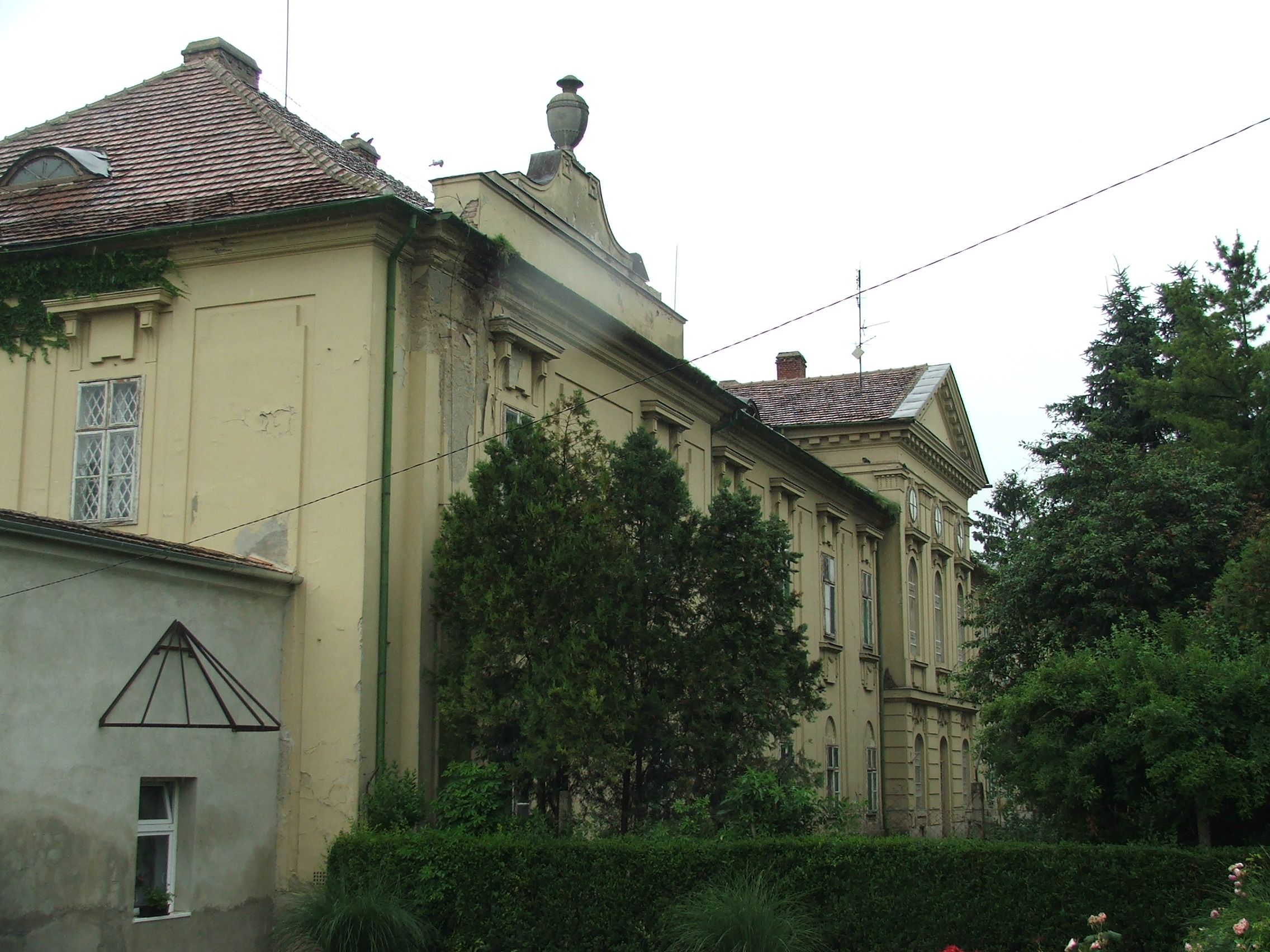 Festetics-kastély, Simaság This is a photo of a monument in Hungary. Identifier: 9316